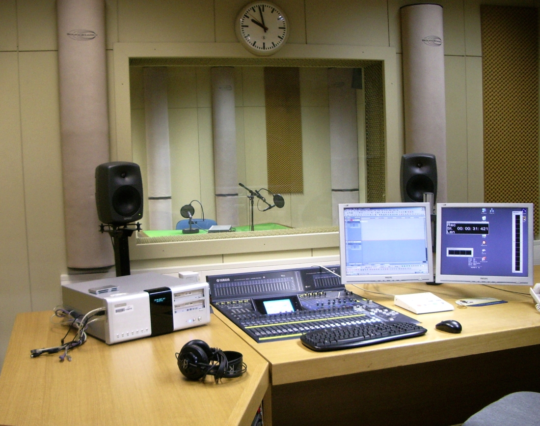 Hrvatska radiotelevizija